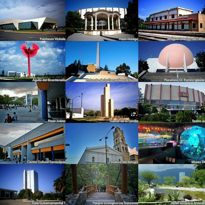 Lugares típicos de Ciudad Victoria